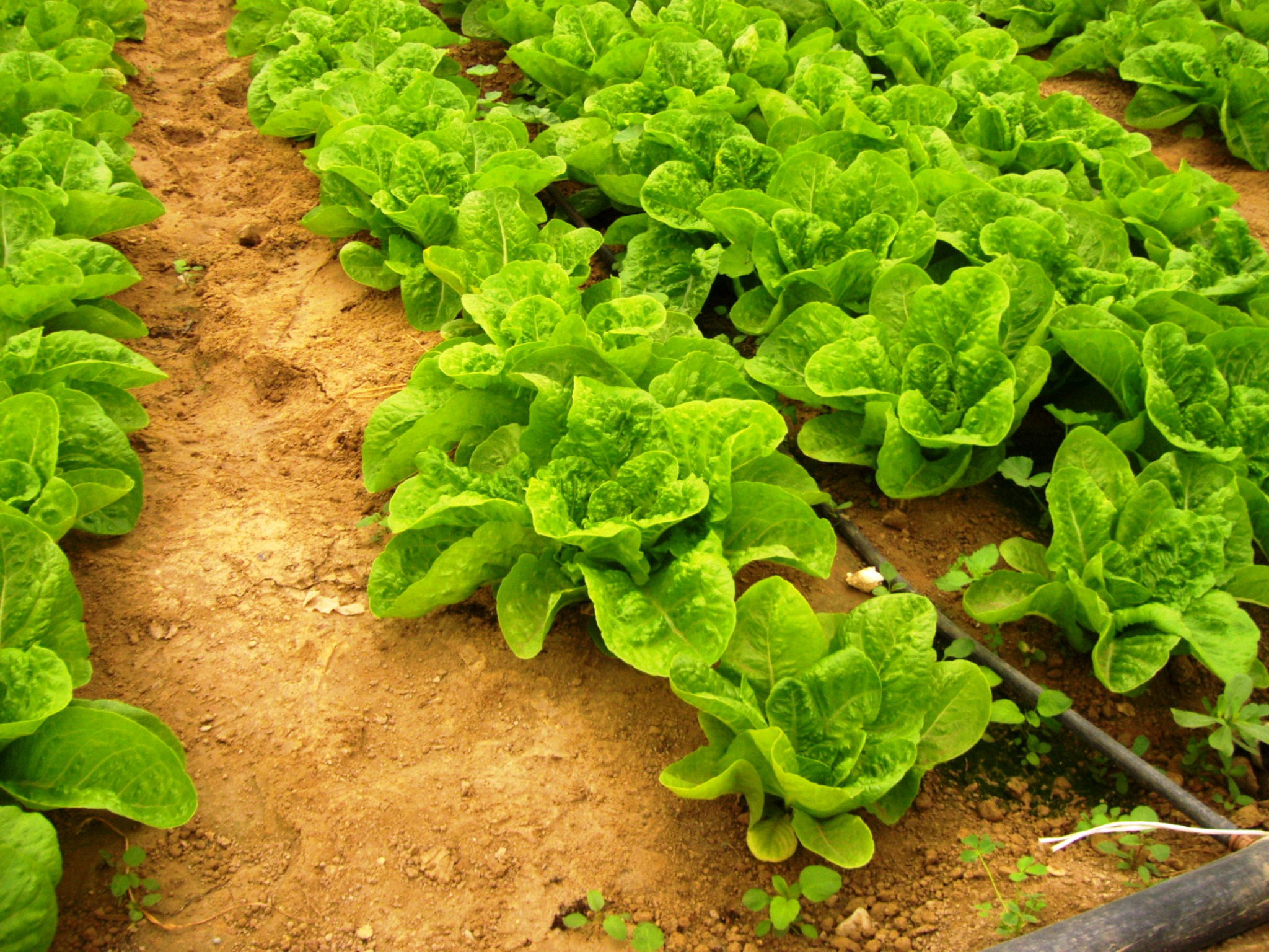 בשדה בכפר דרום.